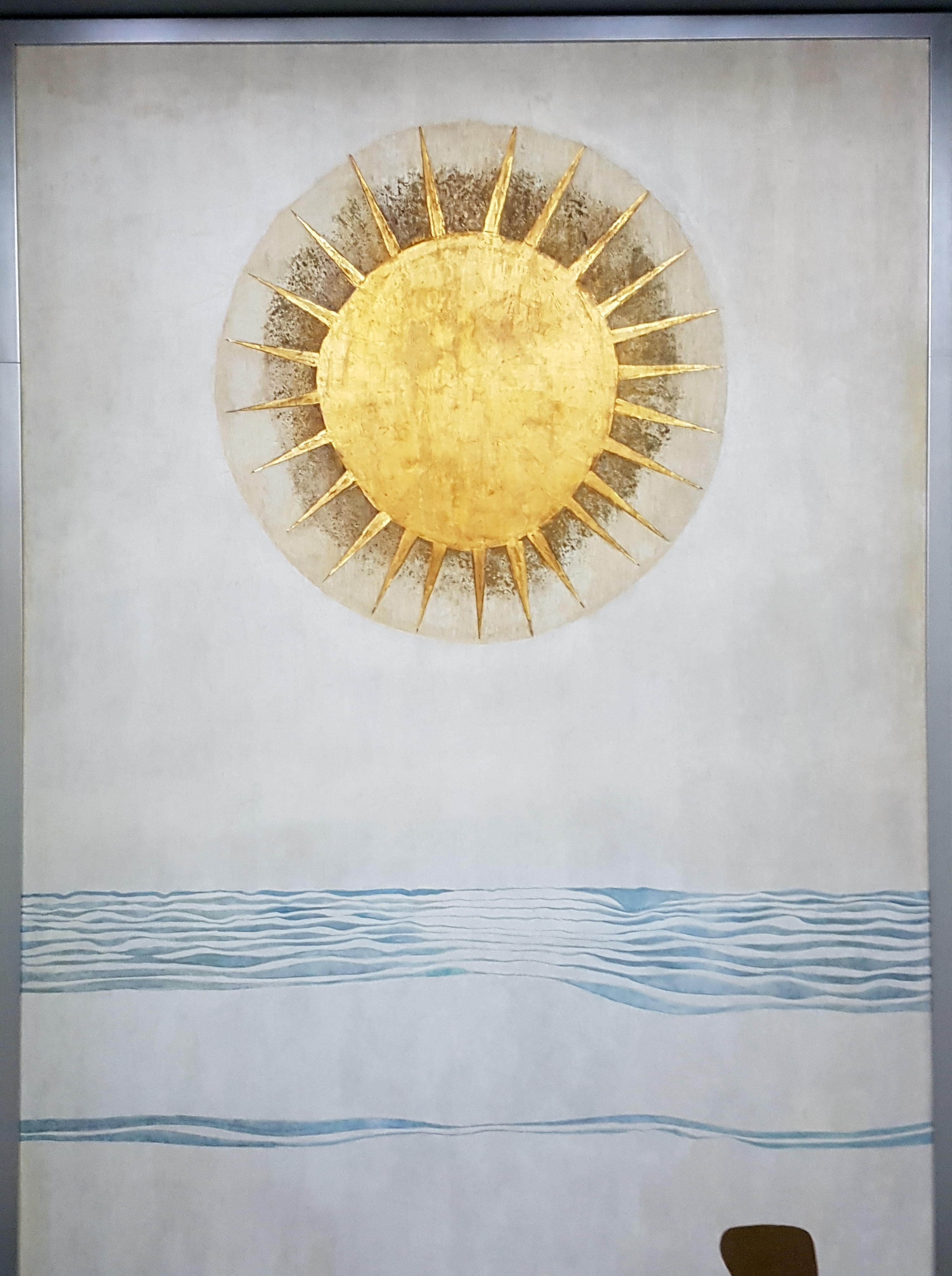 Sol, mural de Nemesio Antúnez en en el descanso de las escaleras que daban al teatro y cine Gran Palace ( calle Huérfanos casi al llegar a Morandé) en Santiago de Chile); foto de diciembre de 2017